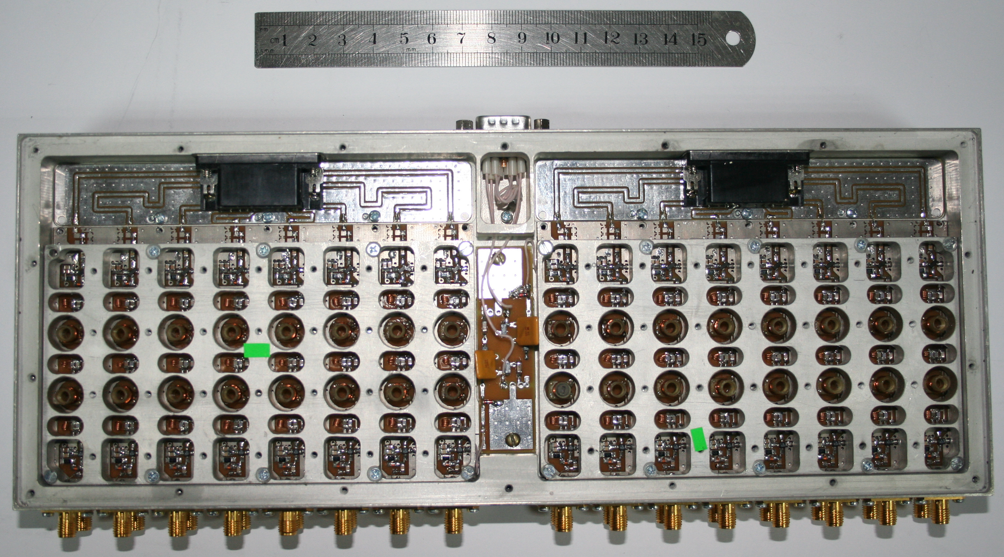 Многоканальный приемный модуль ЦАР